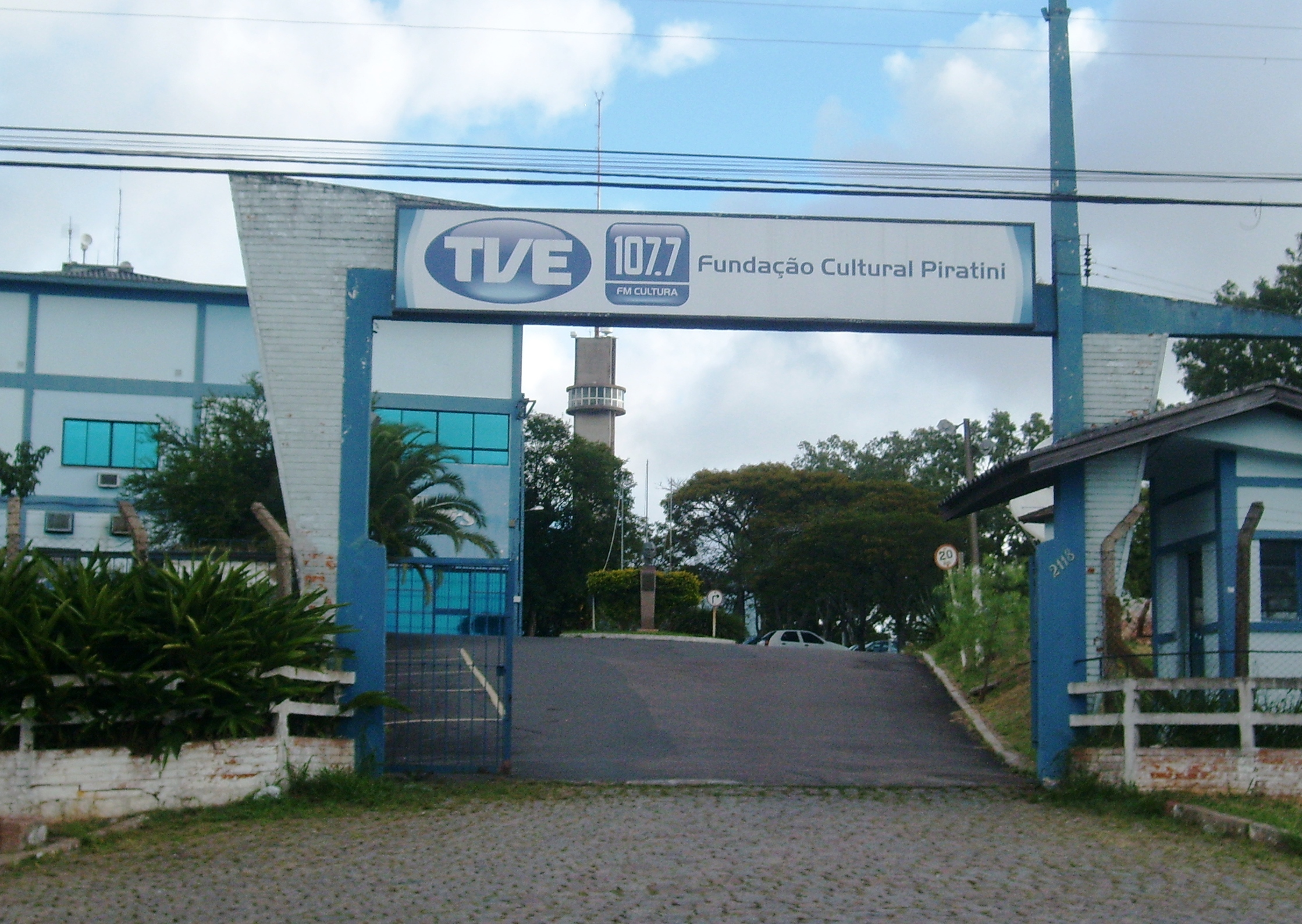 Sede da TVE de Porto Alegre em janeiro de 2010.